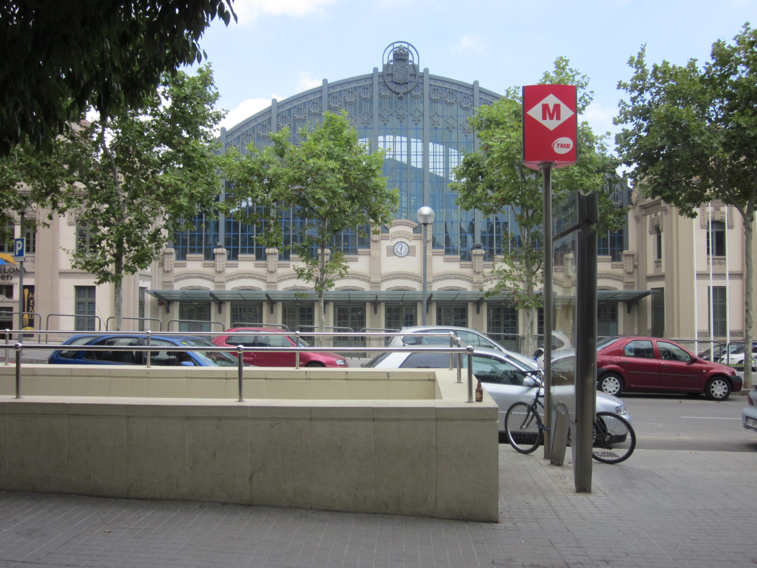 Acceso a la estación de Metro y Adif Arc de Triomf, en la Plaza André Malraux de Barcelona. De fondo la terminal de autobuses y antigua estación de trenes, Barcelona Nord.